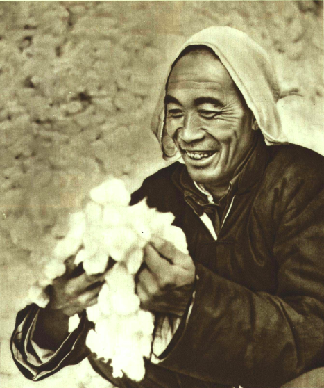 195111 曲耀离